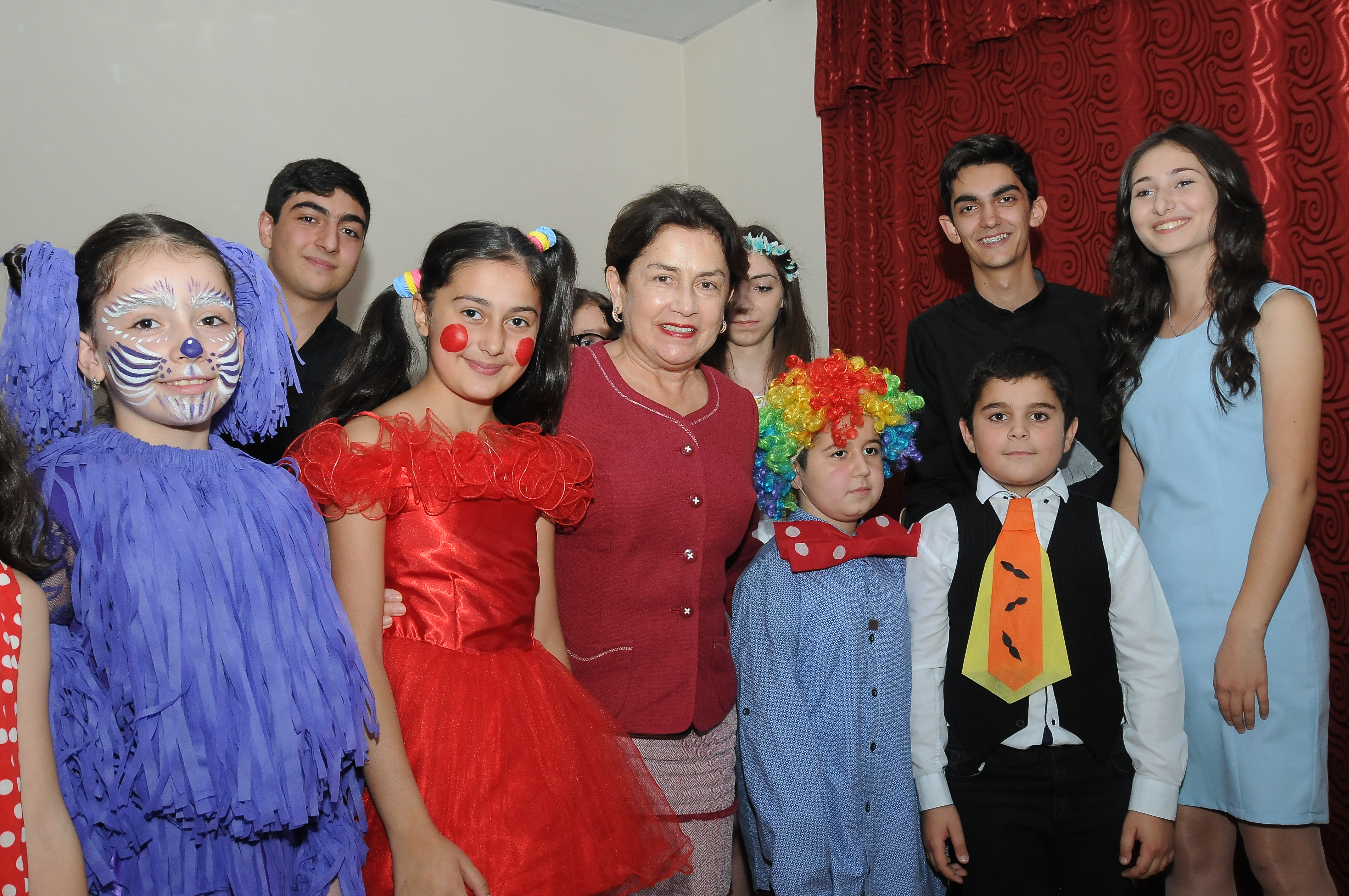 Նունե Սարգսյանն իր հեքիաթի հերոսների՝ գրադարանի ընթերցողների հետ